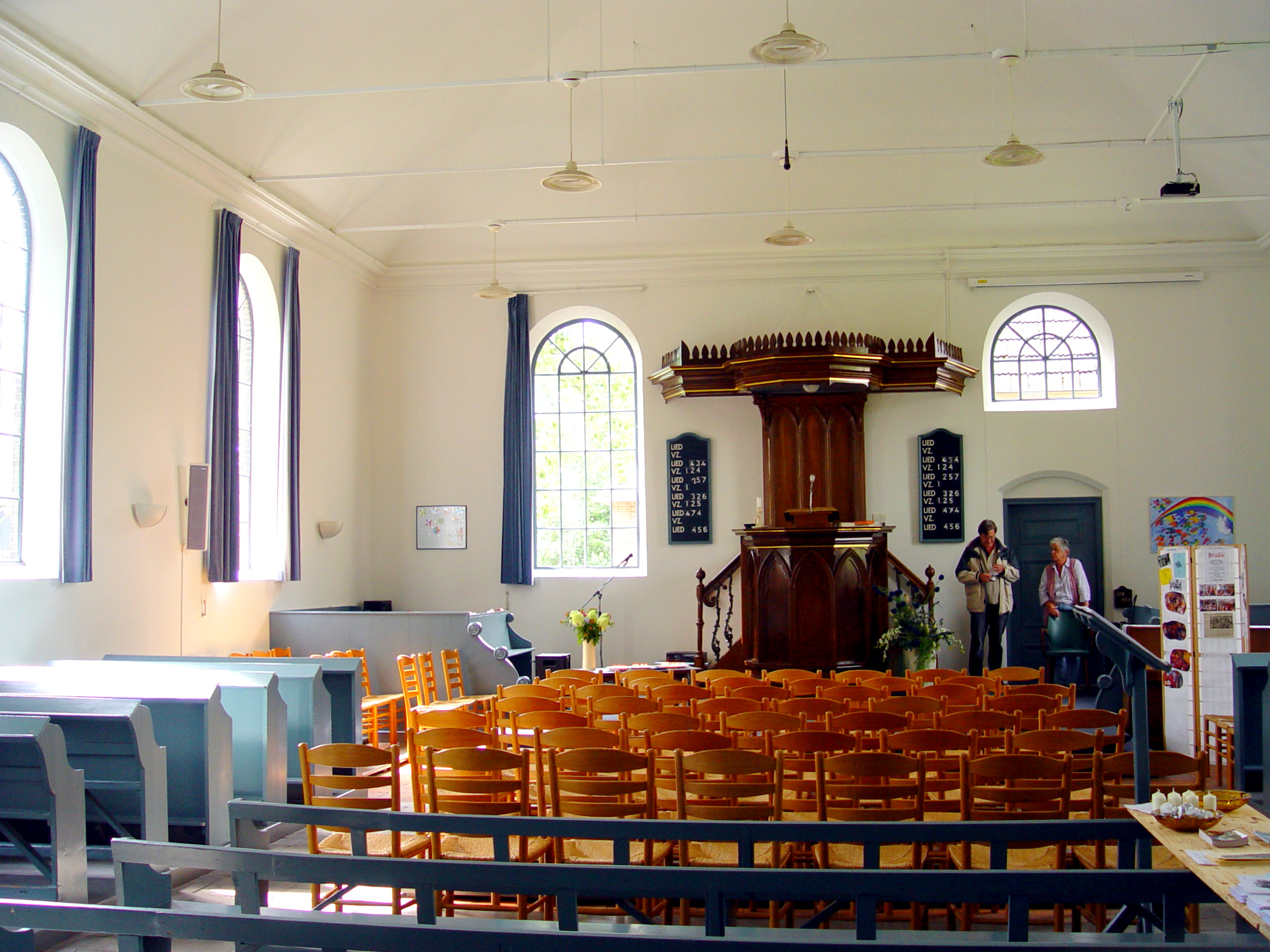 Giethoorn Zuidervermaning - interieur